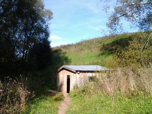 село Порез, ключ